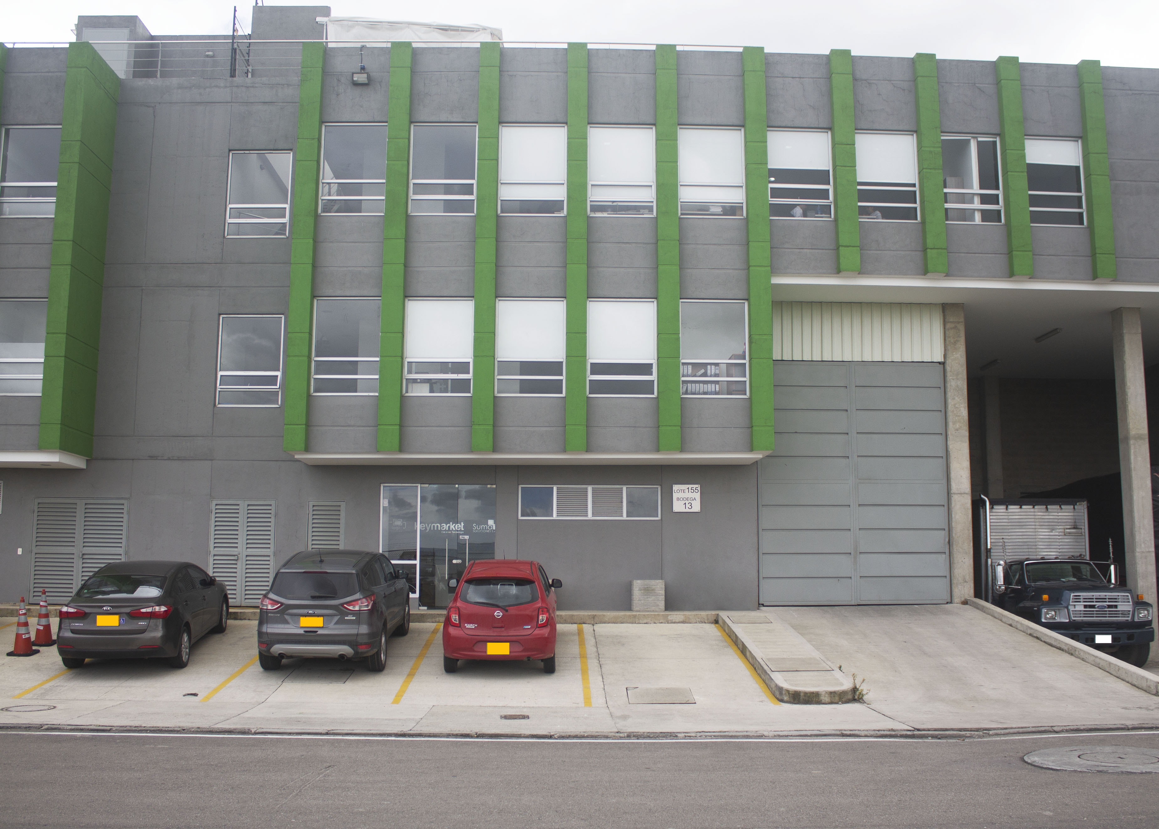 Keymarket, Celta Trade Park Colombia